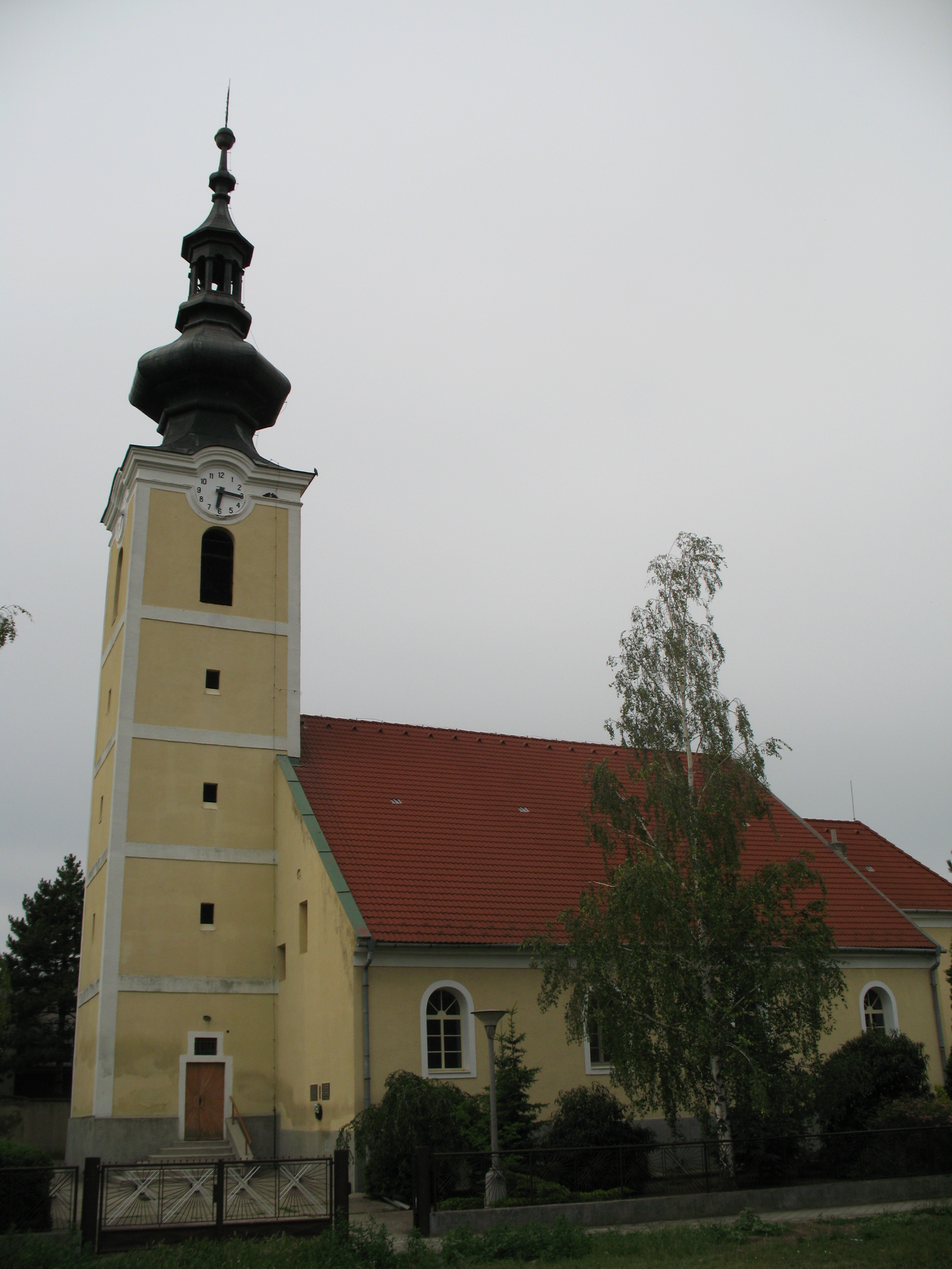 templom